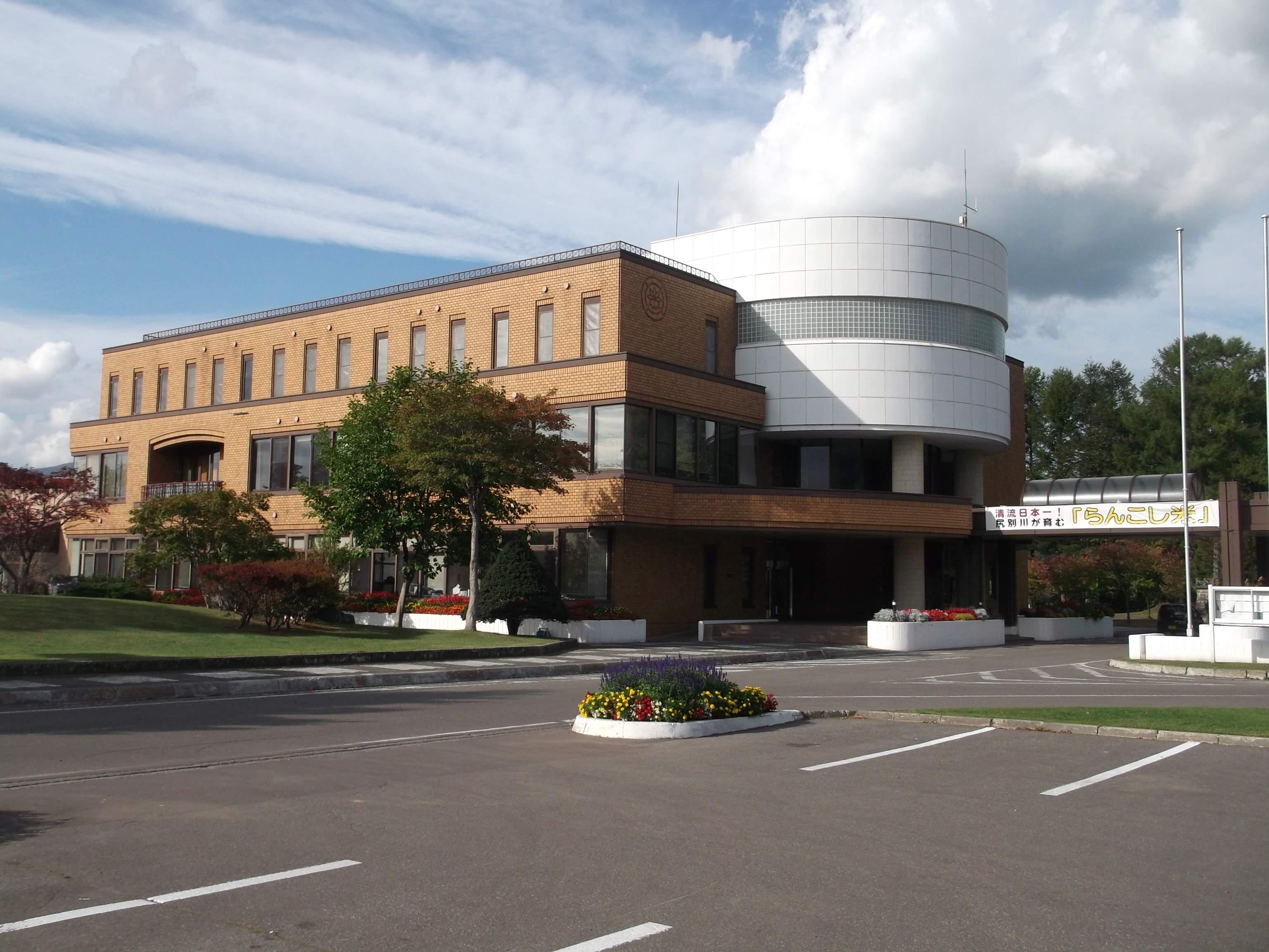 北海道磯谷郡蘭越町役場